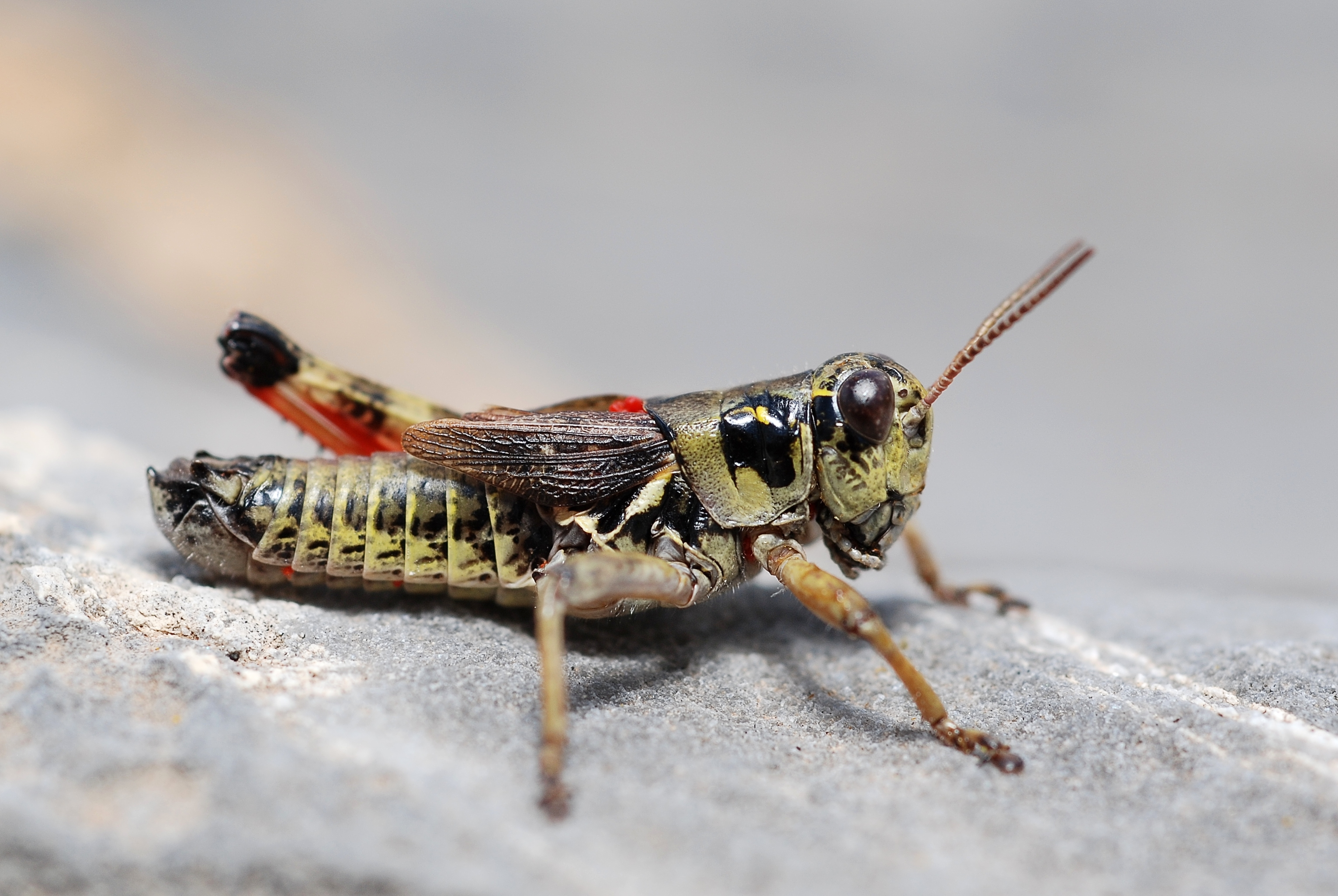 Melanopus frigidus male